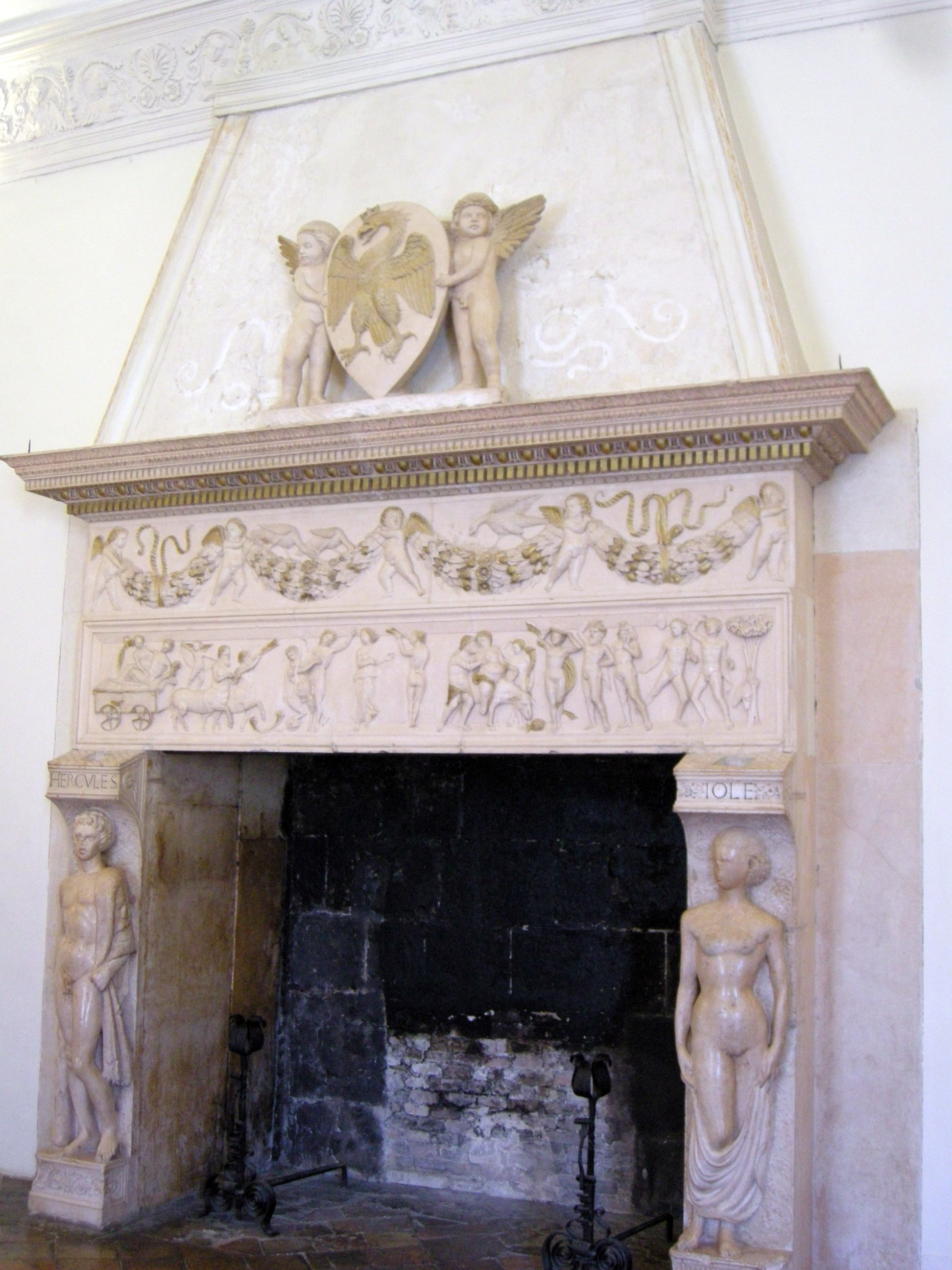 Palazzo Ducale di Urbino - Galleria Nazionale delle Marche - MIBAC This is a photo of a monument which is part of cultural heritage of Italy.